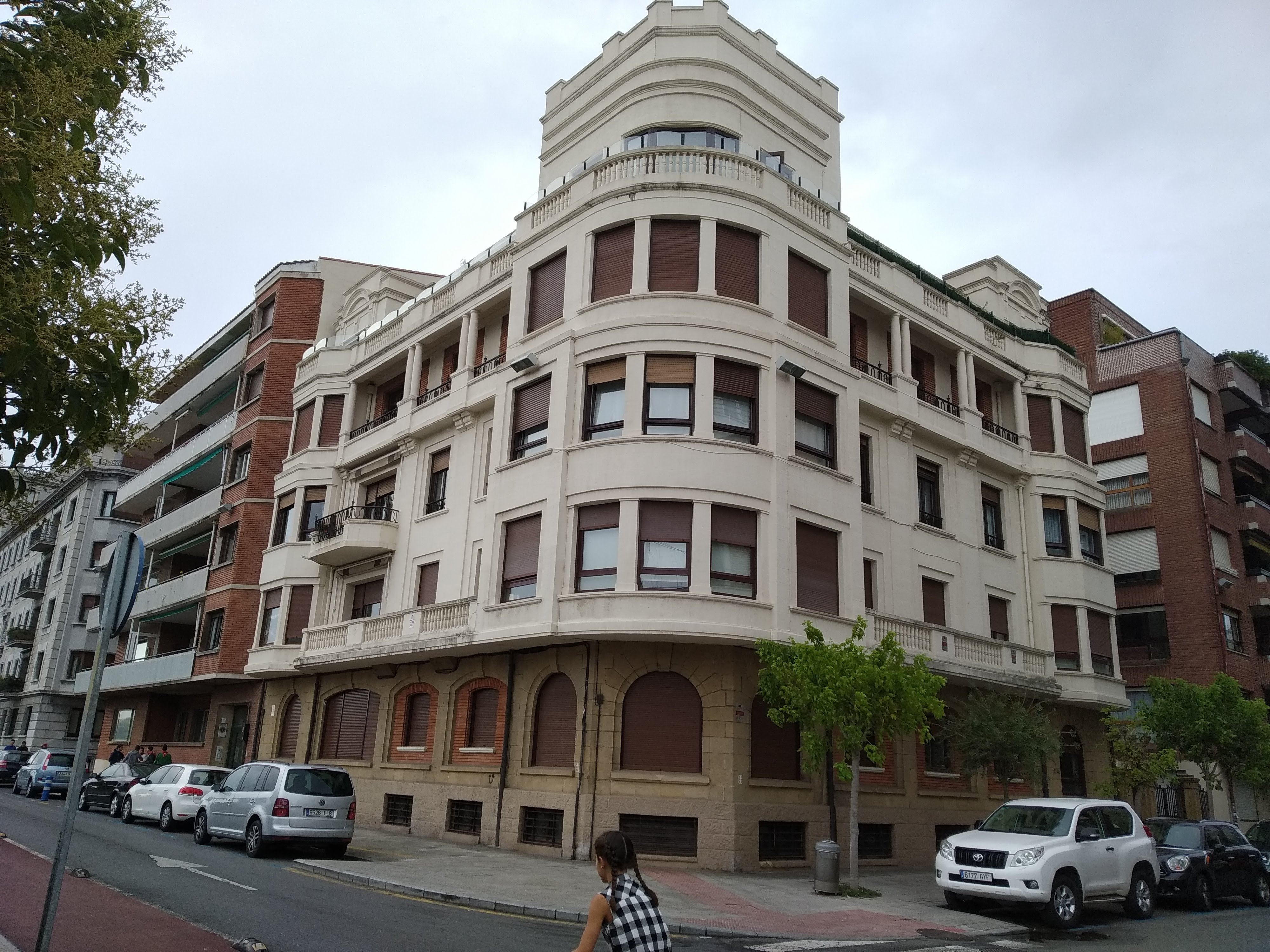 Las Mercedes 1, Evaristo Churruca Kaia etxea